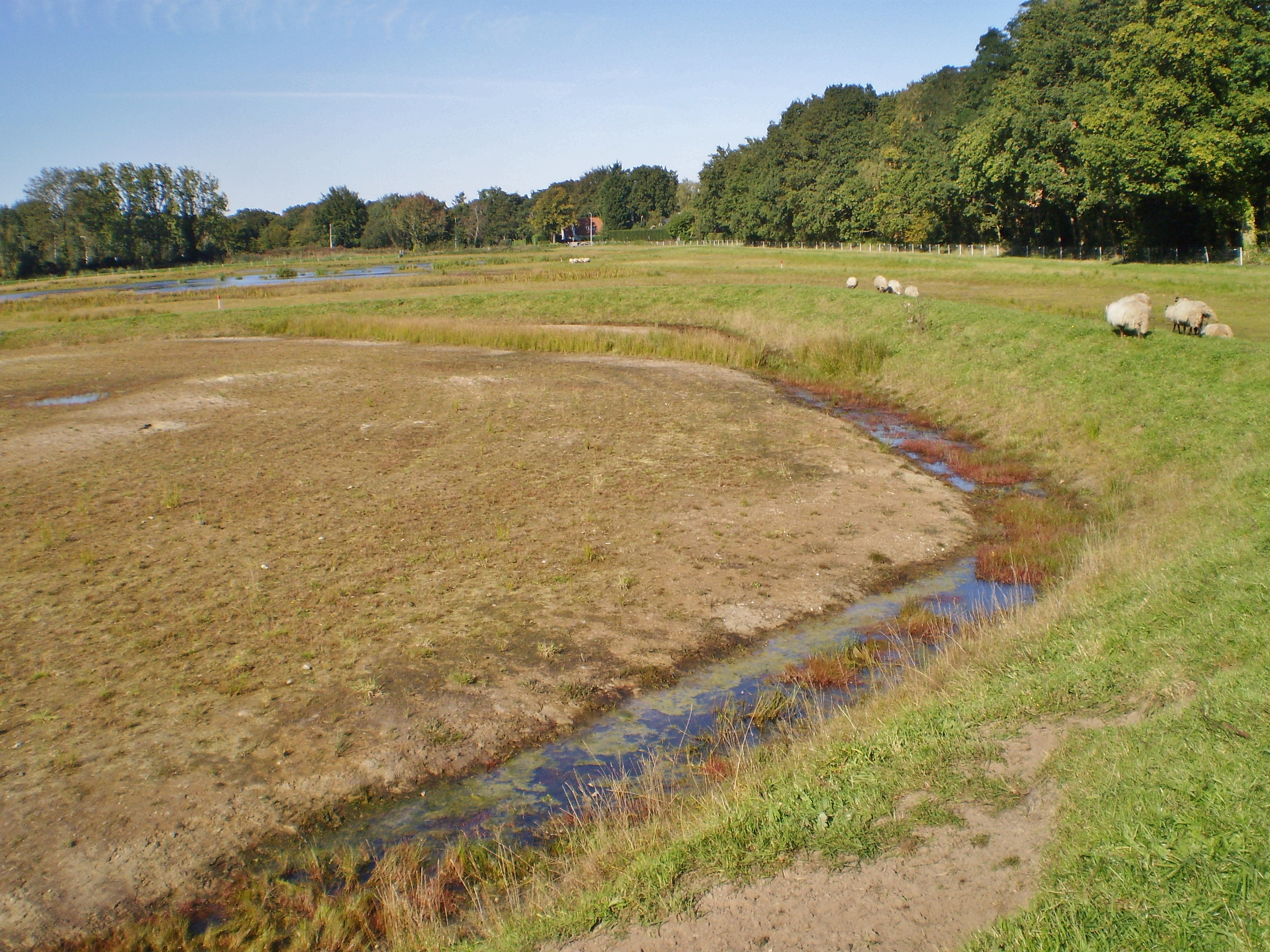 Werk 1 in het Gijzenveen tussen Bussum en de Hilversumse Meent